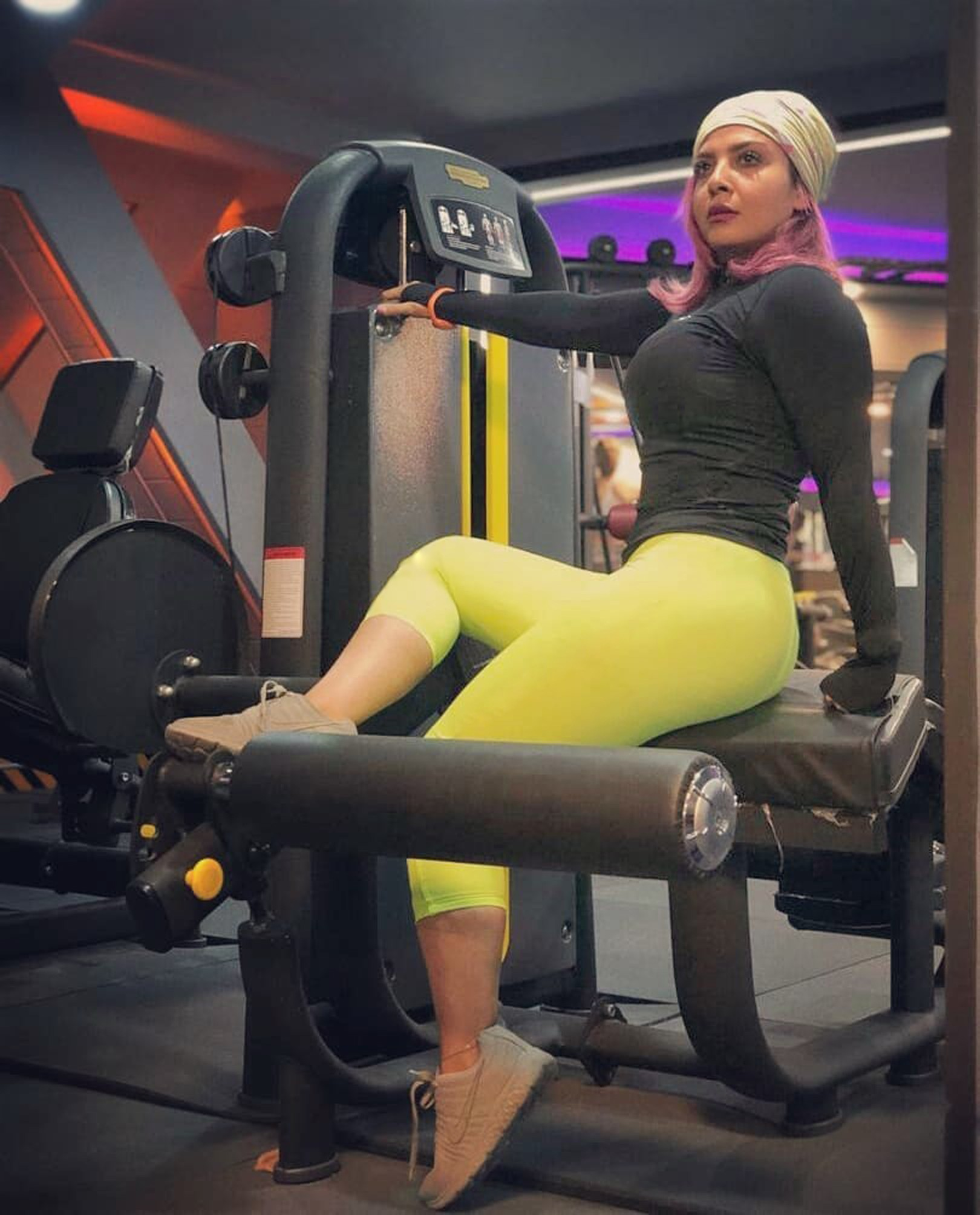 تمرین تناسب اندام در باشگاه خصوصی ، من عکاس این پروند هستم و شما می توانید با مجوزی که در همین صفحه آوردم، از این پروند بدون هیچ محدودیتی به شکل رایگان استفاده کنید. تاریخ عکاسی